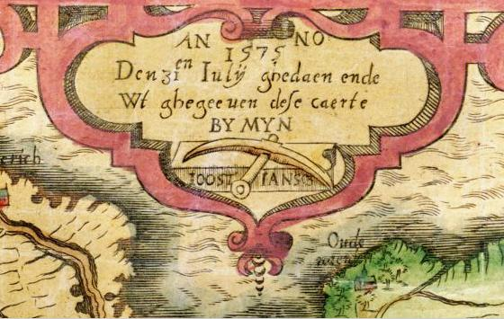 Signature Bilhamer on map of North Holland ("Land caerte ende water caerte van Noort Hollandt ende West-Vrieslandt met d’aenliggende landen")